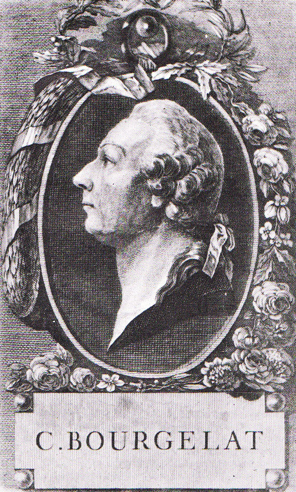 Claude Bourgelat (1712–1779), vétérinaire français et auteur à l’Encyclopédie; gravure sur cuivre, non signée